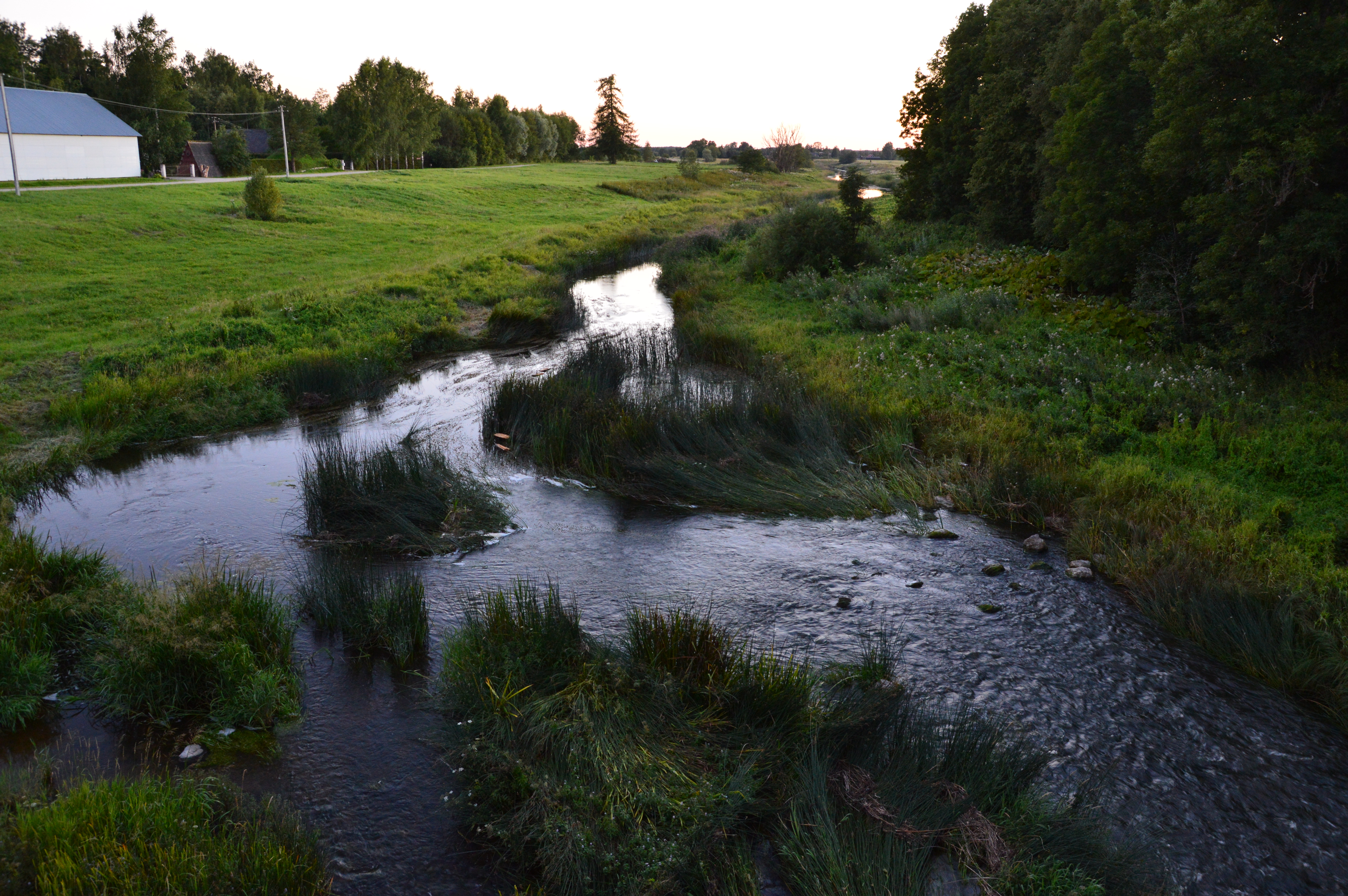 Vigala jõgi Vana-Vigala sillalt.